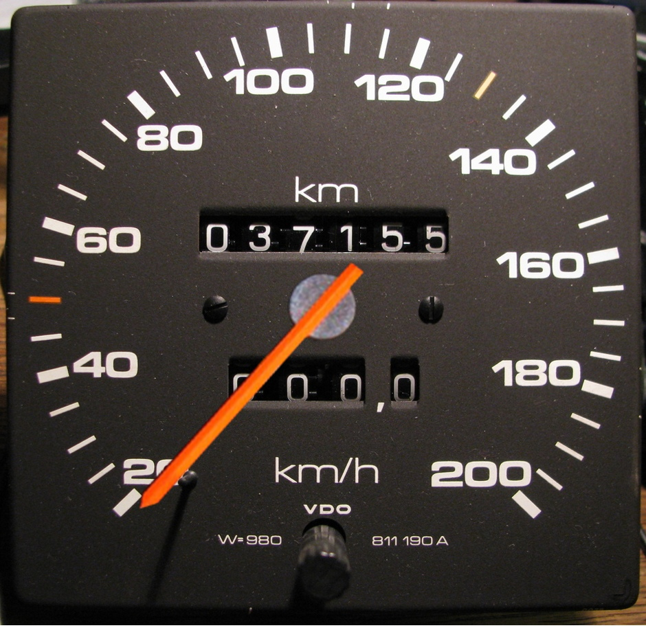 Tachometer eines Autos (Audi 80)